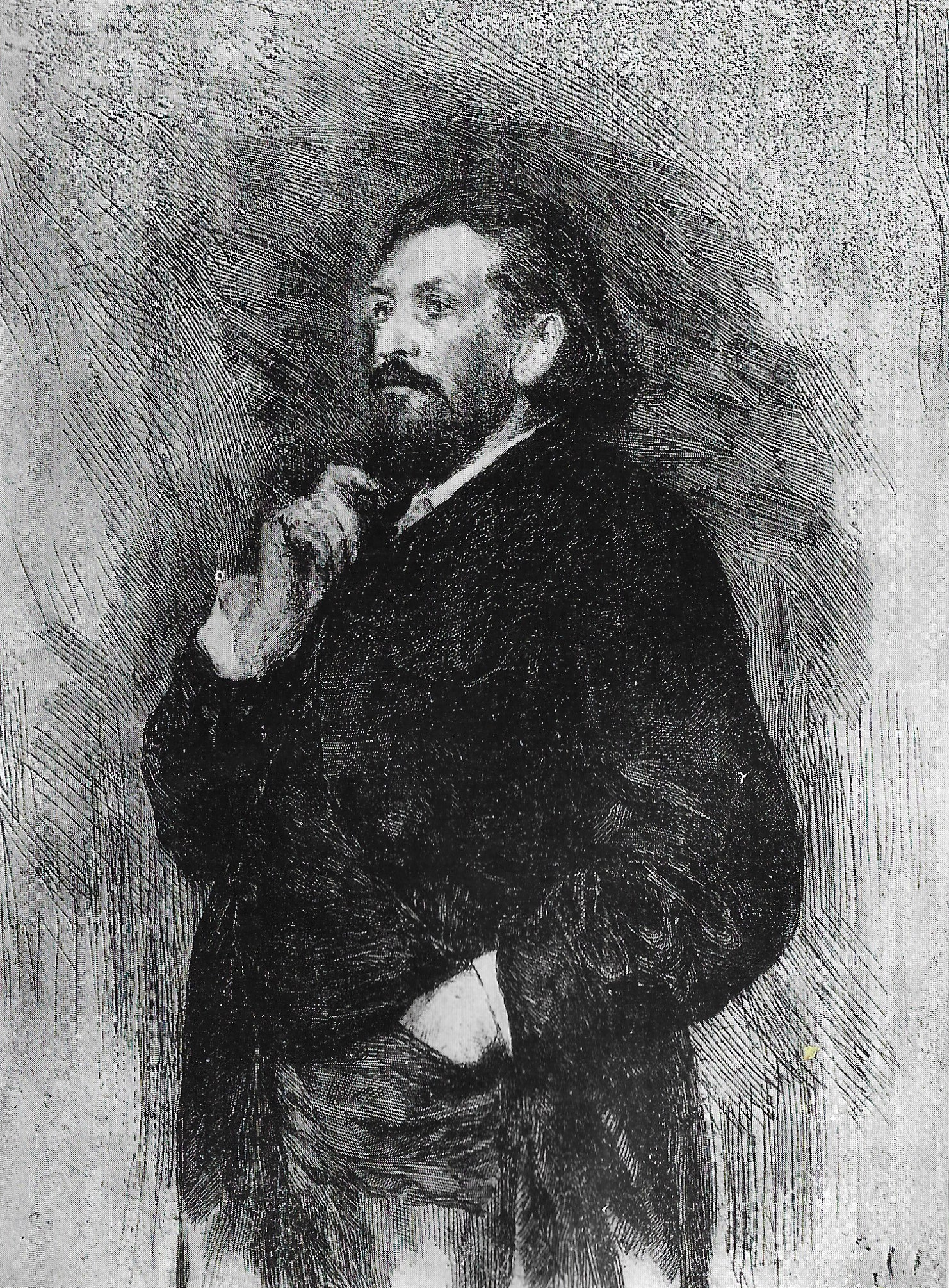 Eau-forte de Vassili Mate Portrait de Belaiev d'après Répine 1897